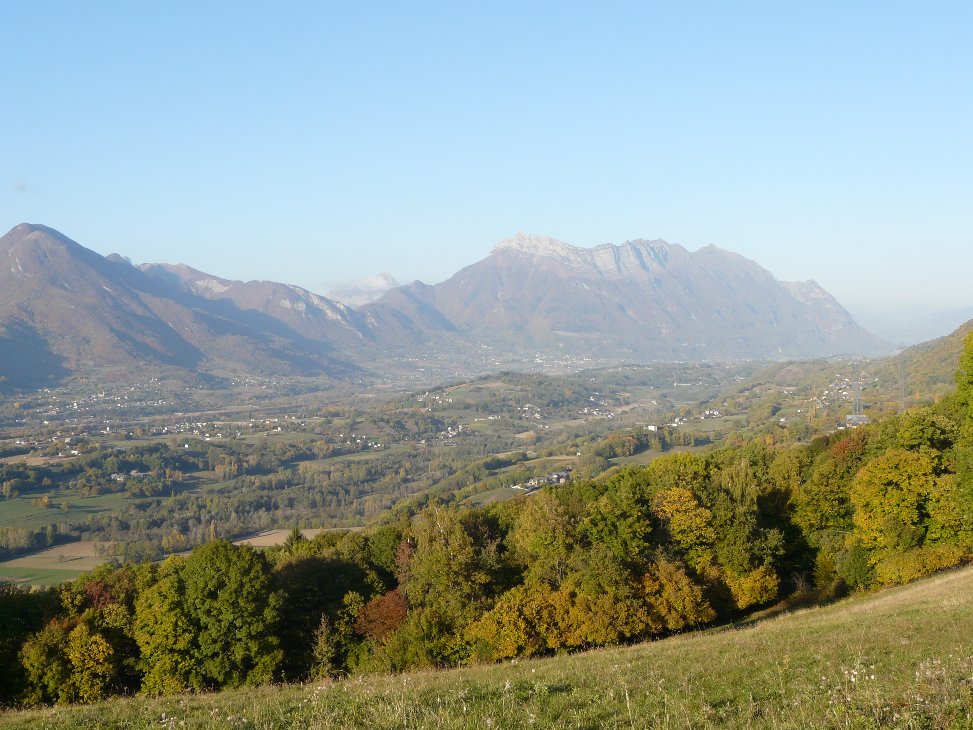 La Combe de Savoie vue depuis les environs de Saint-Pierre-de-Soucy